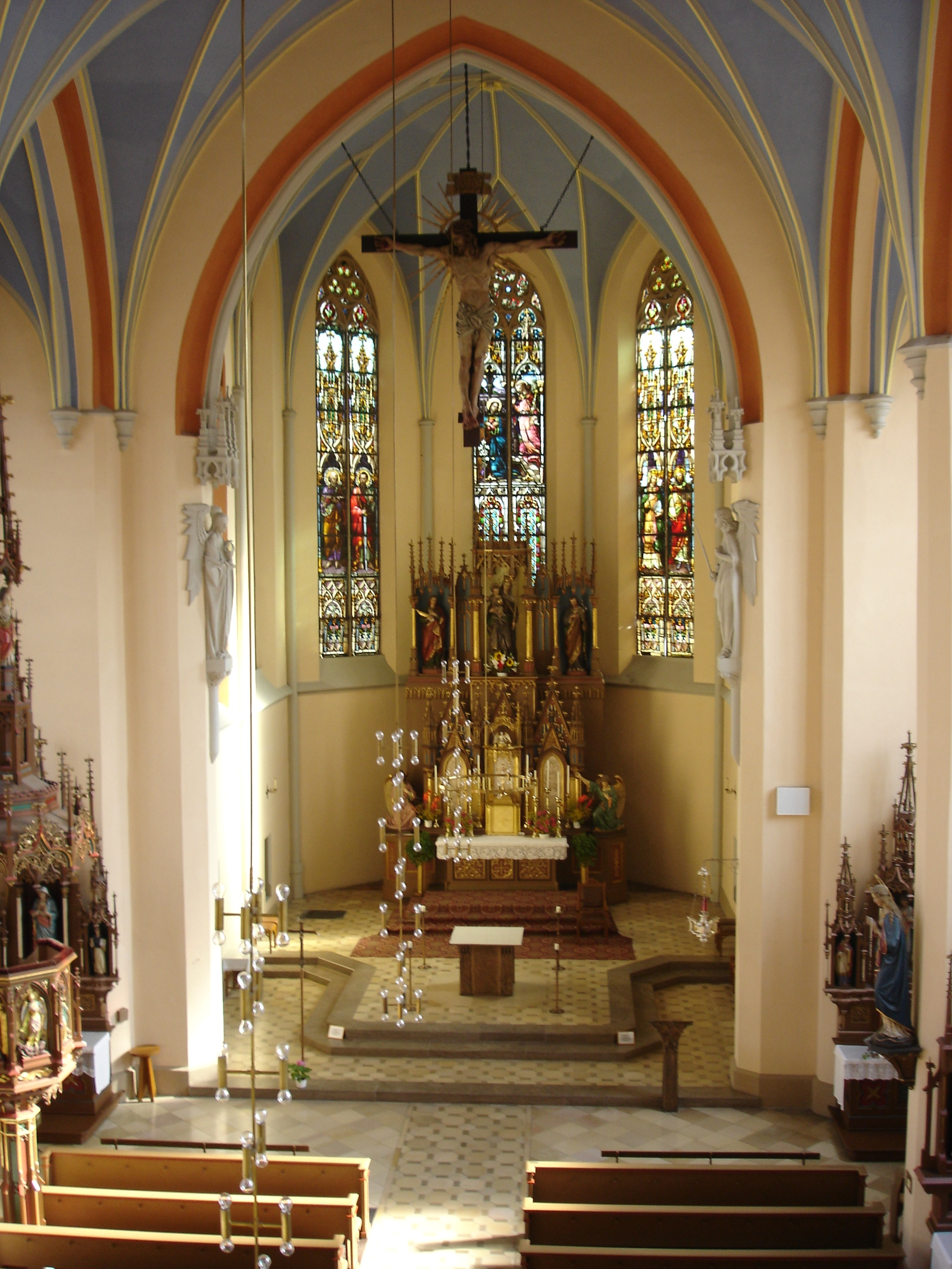 Stadtpfarrkirche St. Marien Chorraum